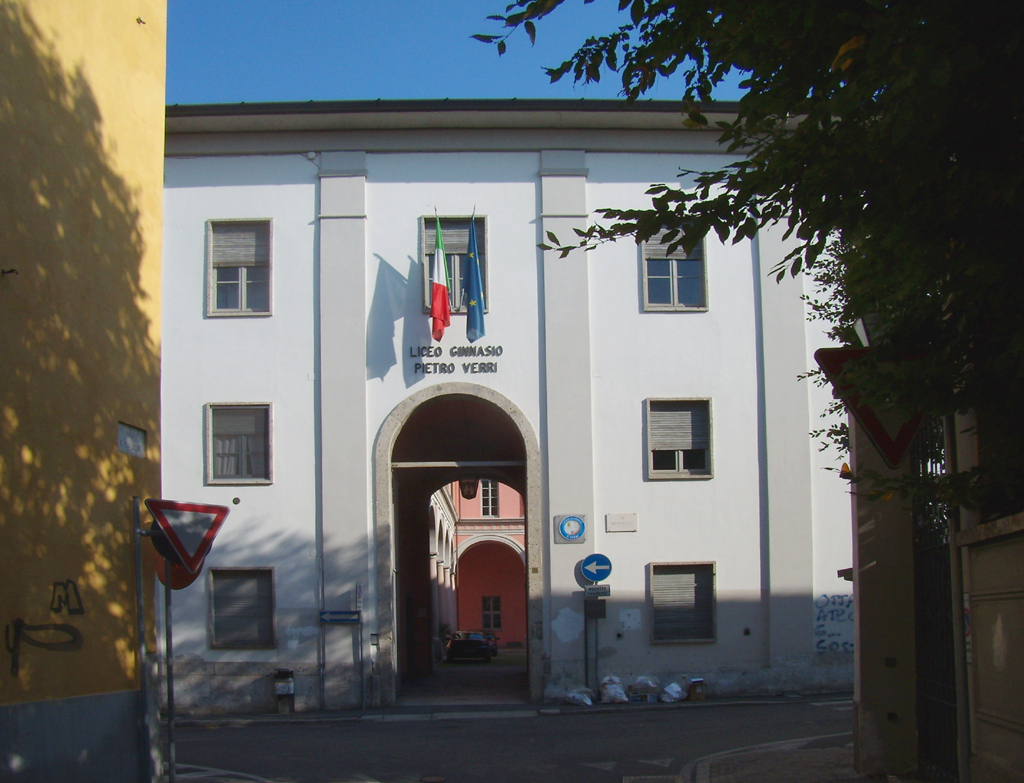 Ingresso del Liceo Ginnasio "Pietro Verri" a Lodi